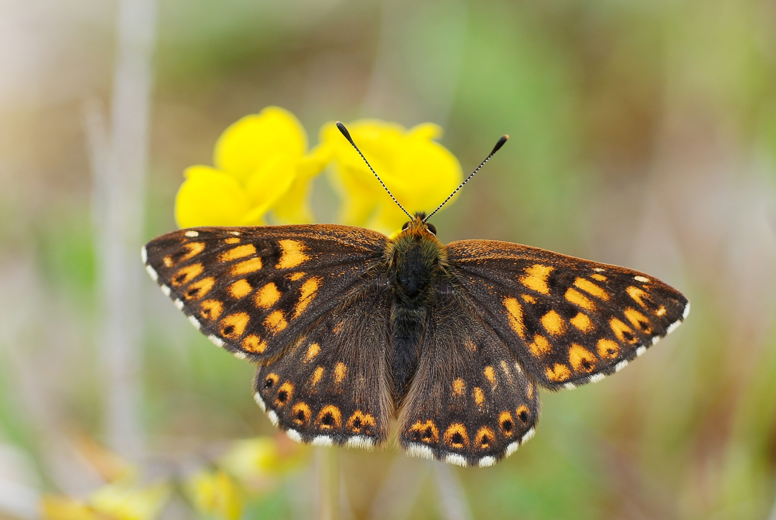 Hamearis lucina